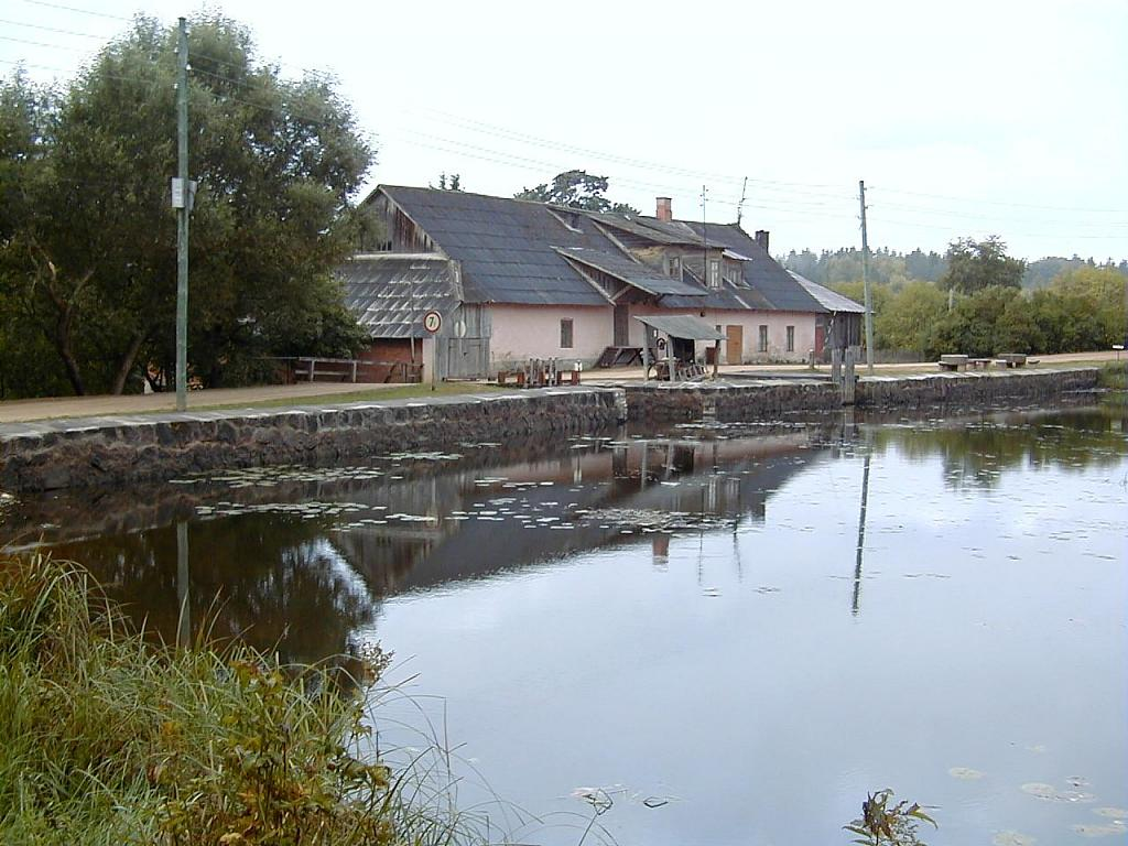 Ottes dzirnavas. 2002-09-14